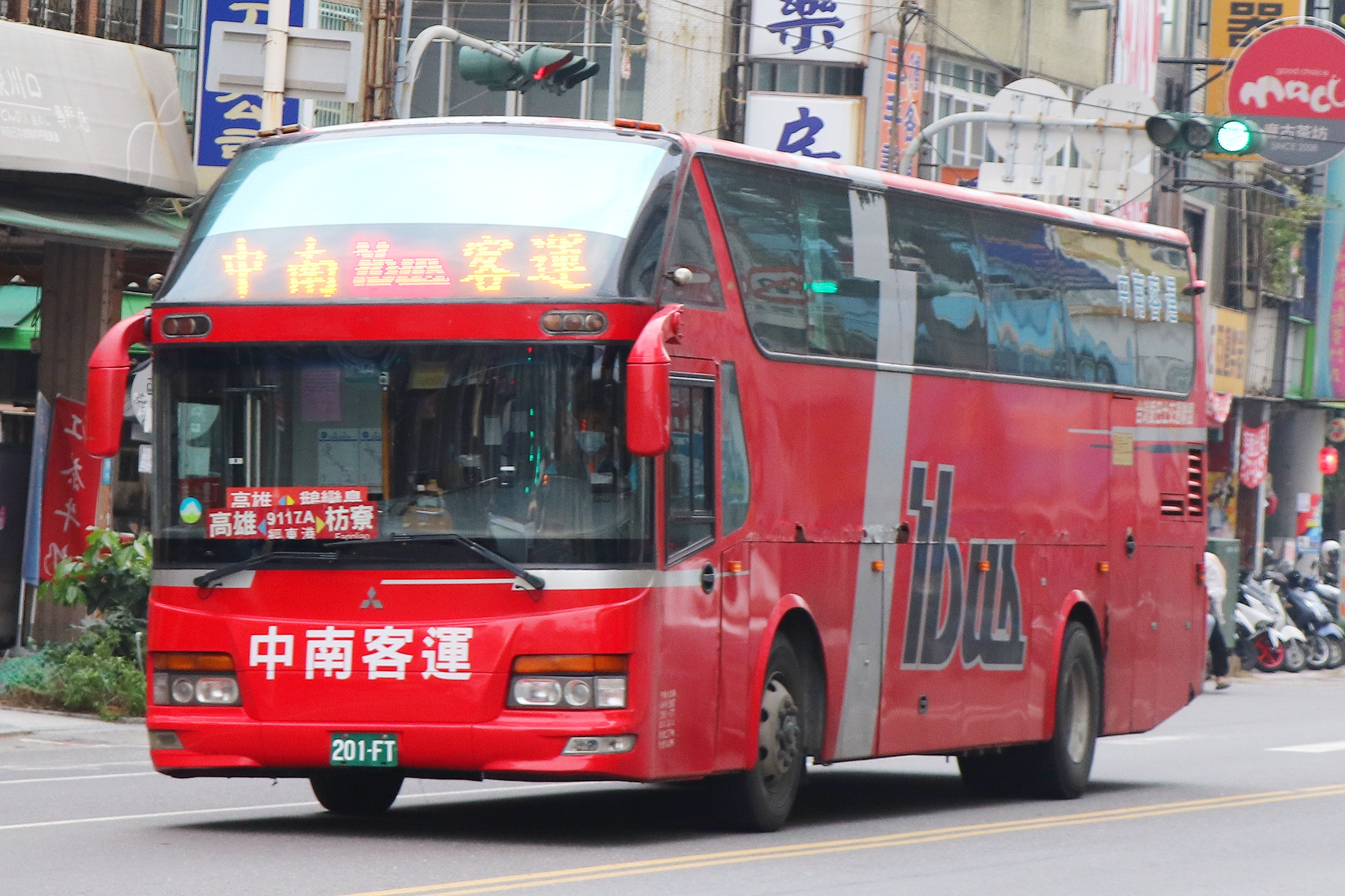 中南客運 FUSO RM11FNL 大客車 201-FT